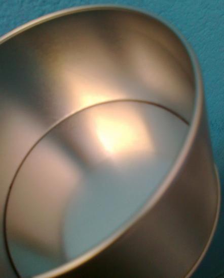 evitar cortes